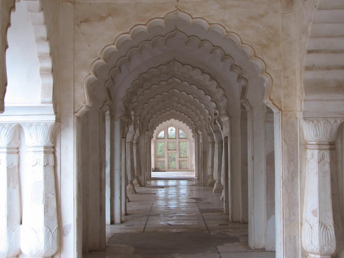 Inside Bibi Ka Maqbara in Aurangababd in Maharashtra , India.